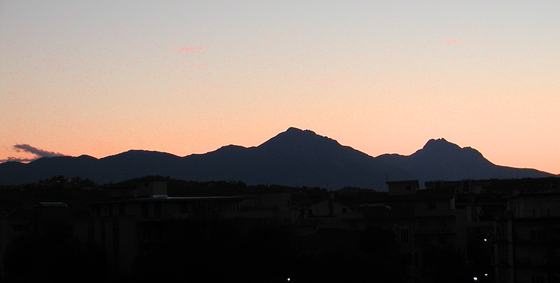 "La Bella Addormentata" die schlafende Schönheit geformt von den Bergen des Gran Sasso.